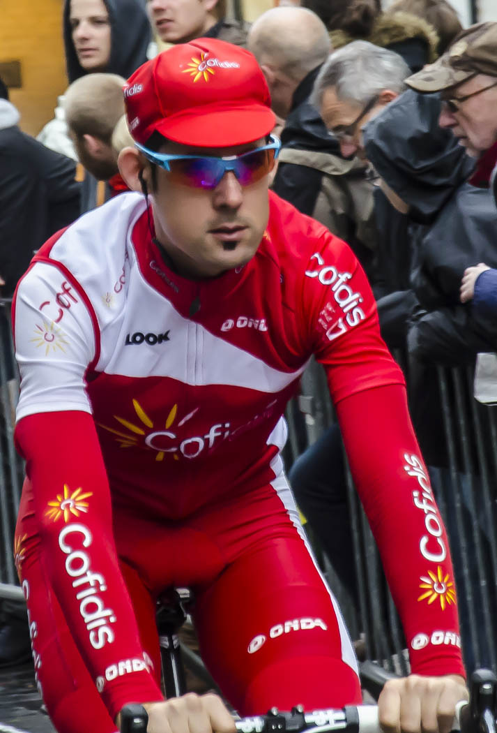 Egoitz Garcia bij de start van de Ronde van Vlaanderen 2014 in Brugge.